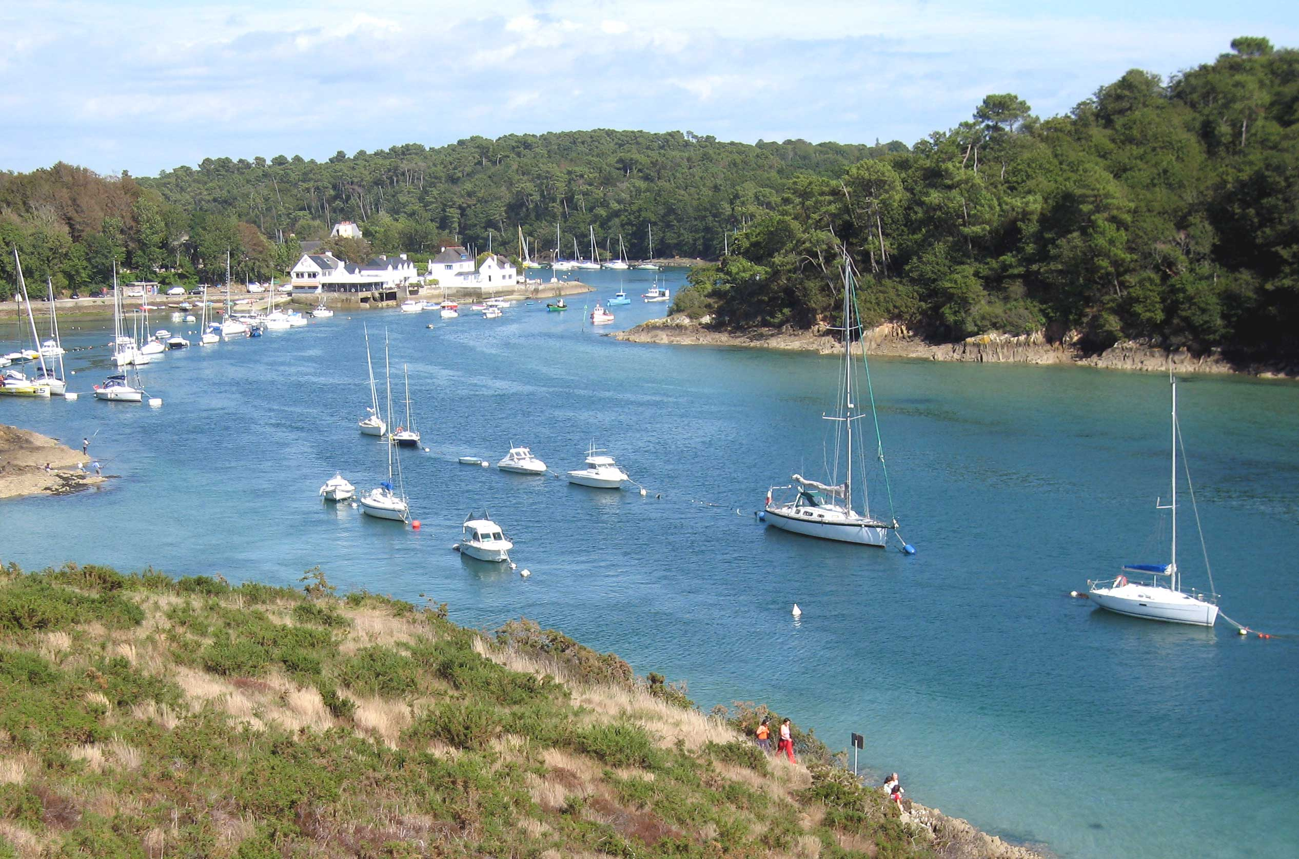 ria de Belon à Riec-sur-Belon, Bretagne, France